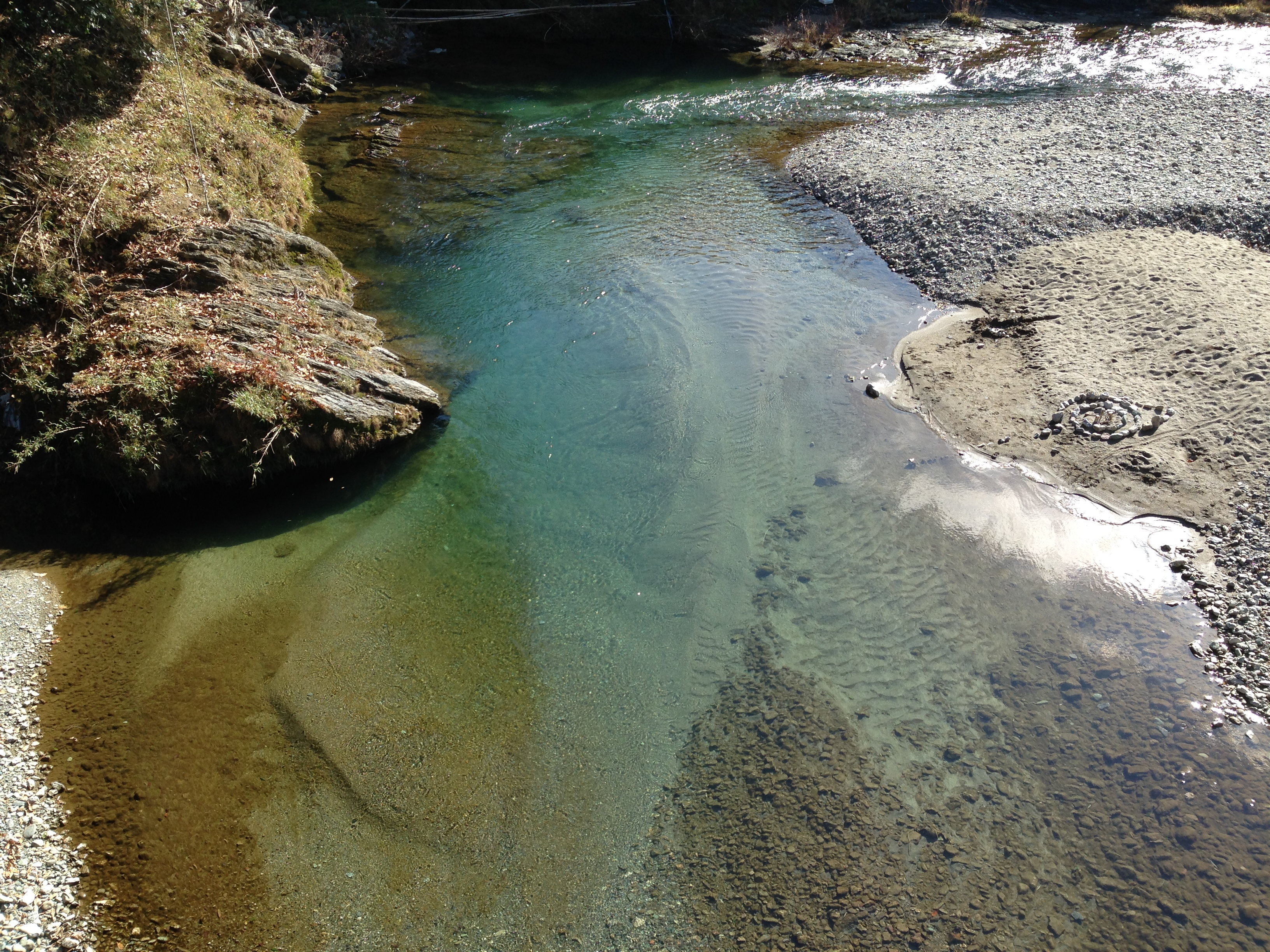 十三神社付近の参道橋「みやばし」より、貴志川を撮影。